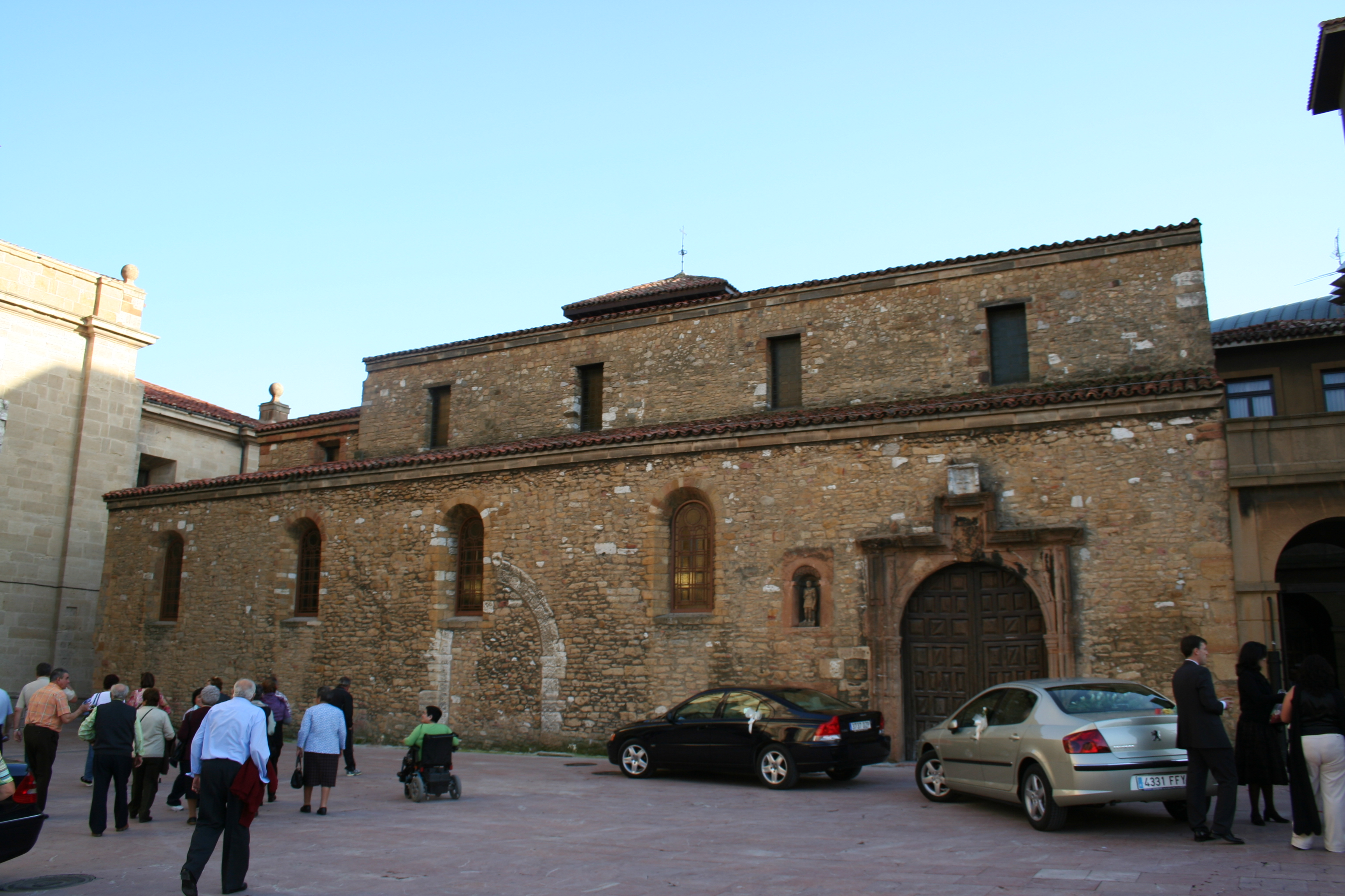 imagen exterior iglesia de San Tirso